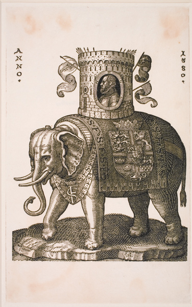 Melchior Lorck (1527-1626), Elefantordenens emblem, 1580